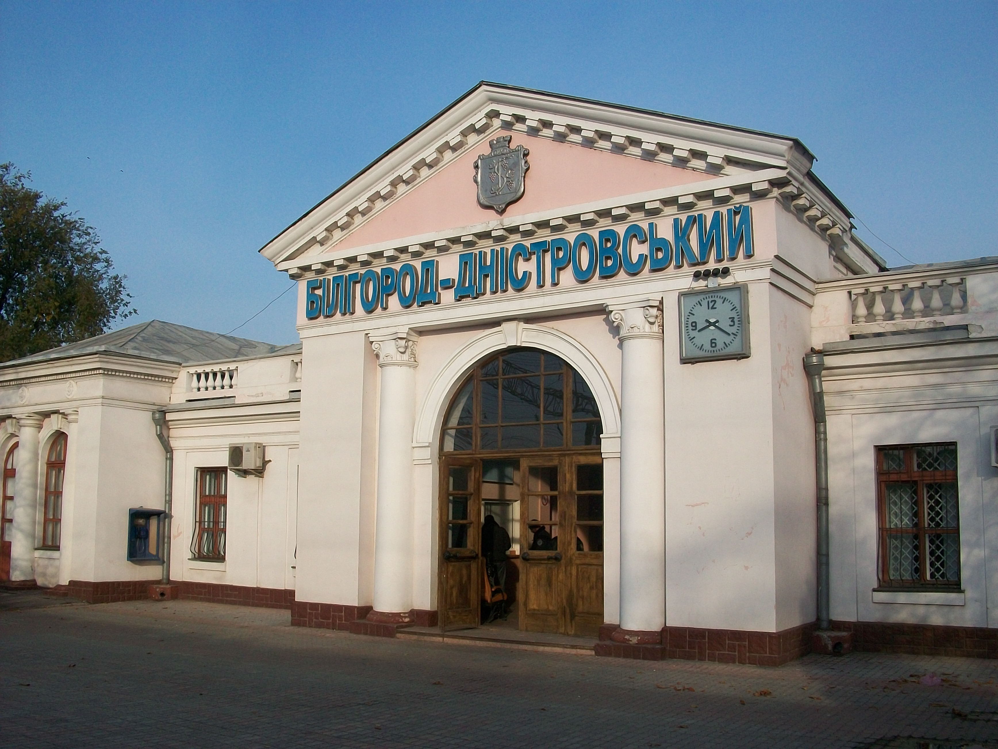 Білгород-Дністровський (станція)